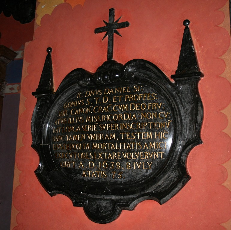 Grzadam11. Own work